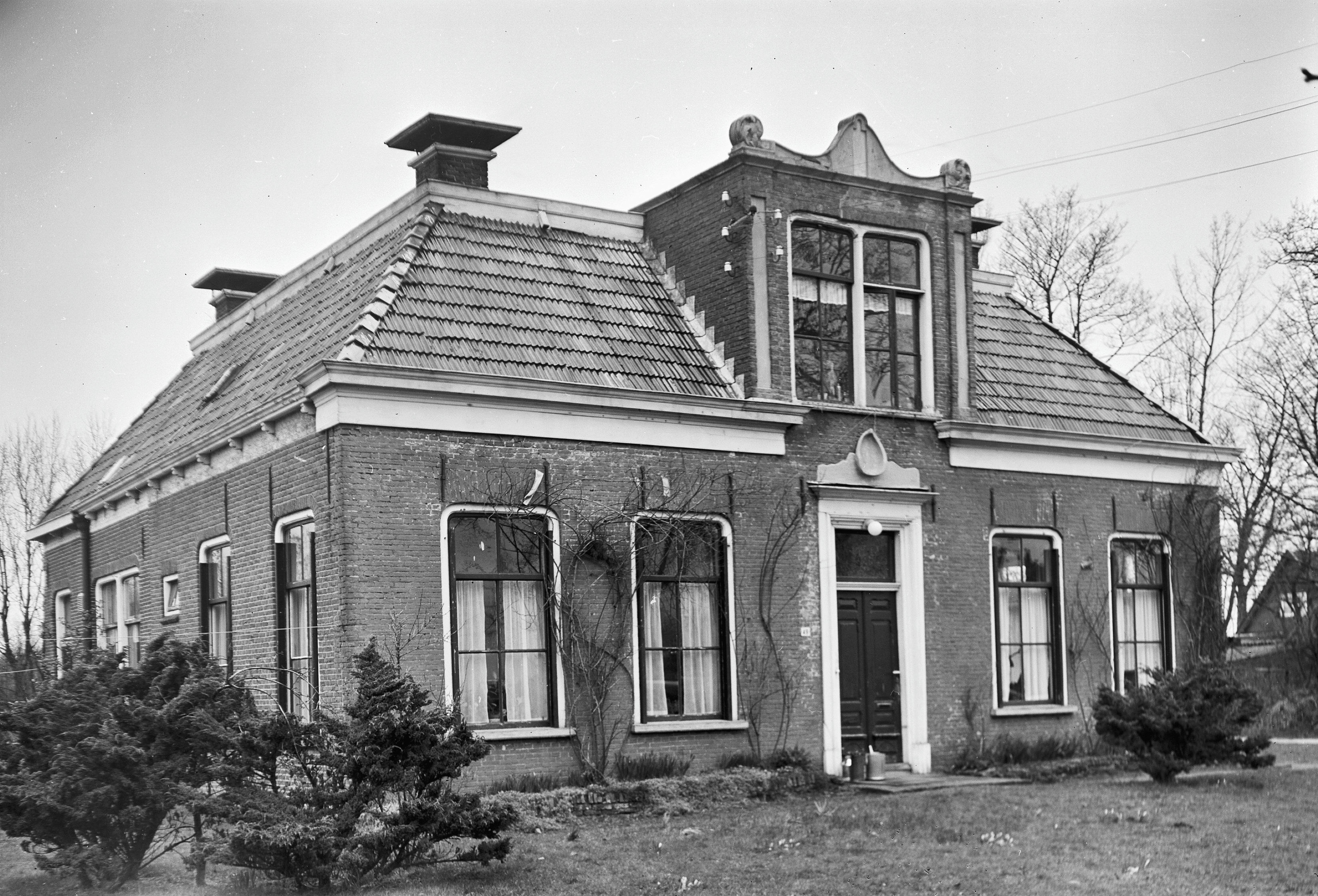 voorgevel